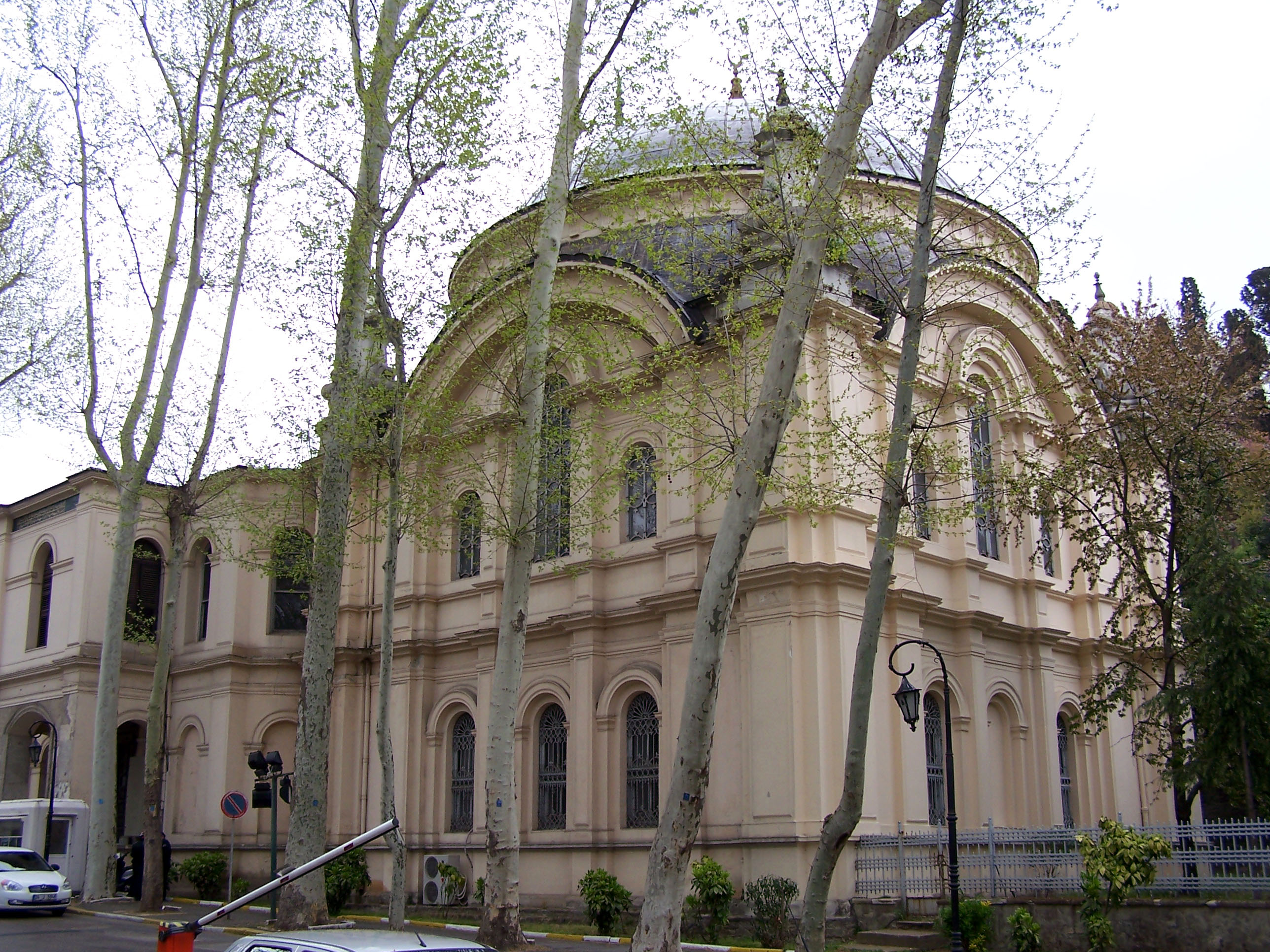 Küçük Mecidiye Camii in Beşiktaş, İstanbul, Turkey